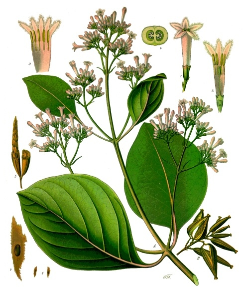 Chinarindenbaum. A blühender Zweig, natürl. Grösse; B Theil der Fruchtrispe, desgl.; 1 Blüthe, vergrössert; 2 dieselbe im Längsschnitt, desgl.; 3 aufgeschnittene Kronenröhre, desgl.; 4 Querschnitt des Fruchtknotens, vergrössert; 5 Kapsel, zerschnitten, mit freigelegten Samen, desgl.; 6 Same, natürl. Grösse und 7 vergrössert.